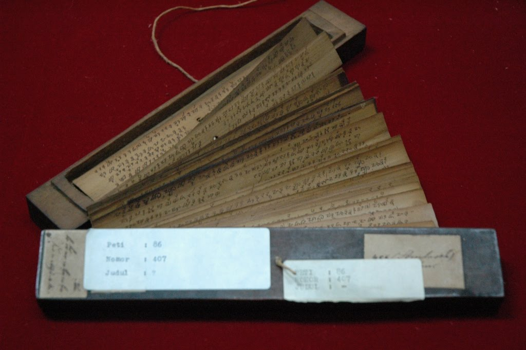 Sunda: Naskah Sunda tina lontar